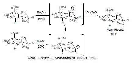 Mecanismo de reaçãocom Efeito anomérico em Radicais